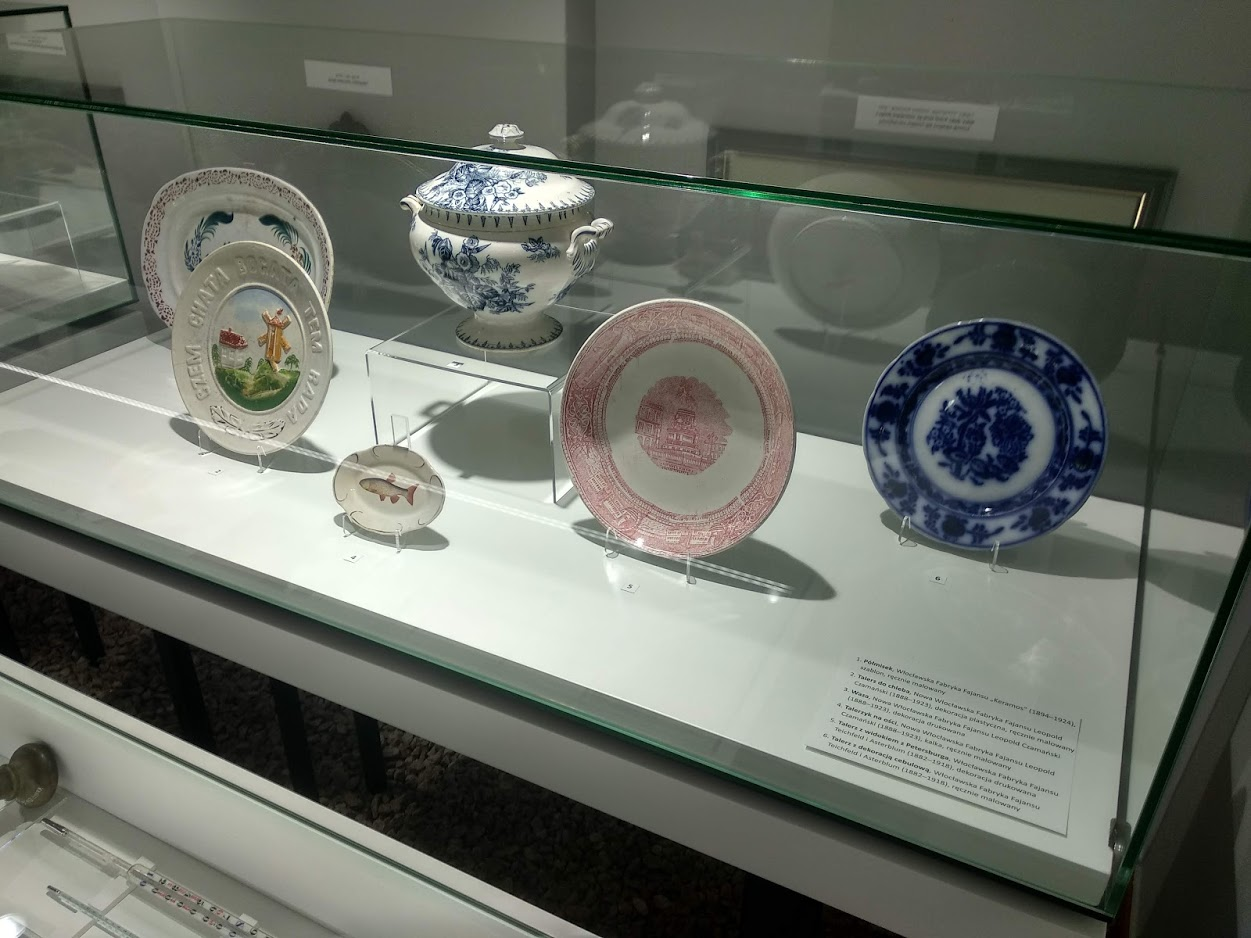 Muzeum Historii Włocławka (2019 r.)